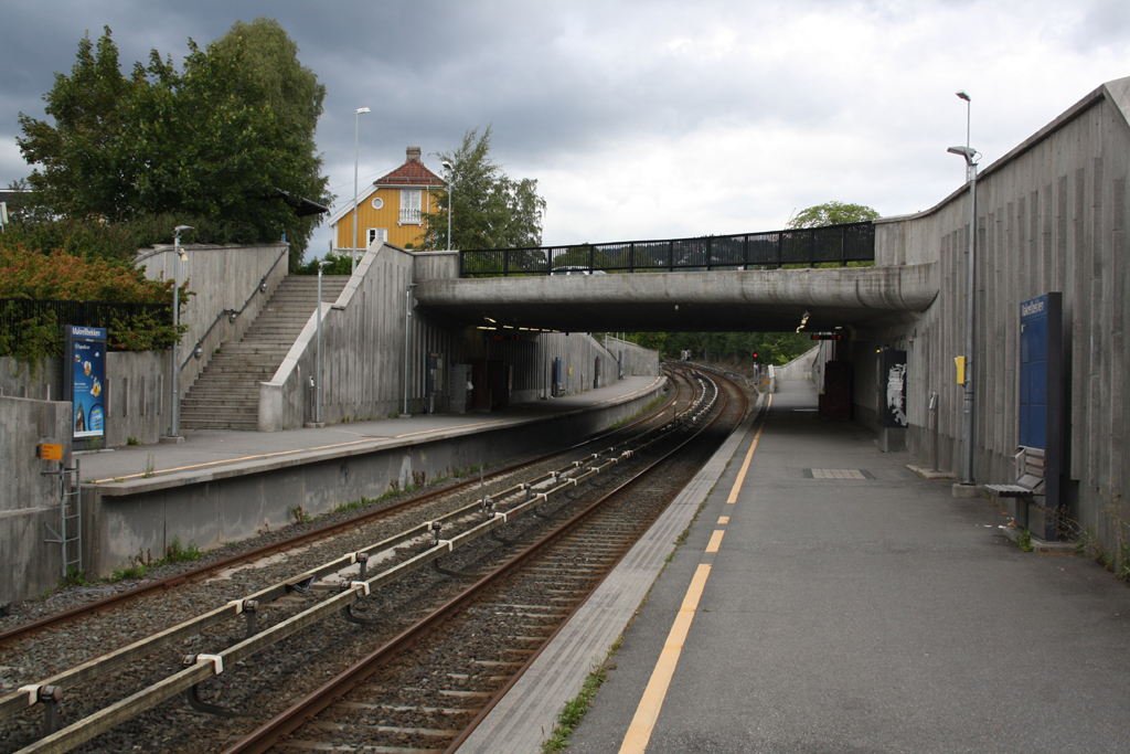 Makrellbekken T-banestasjon sett fra perrongen mot Hovseter.